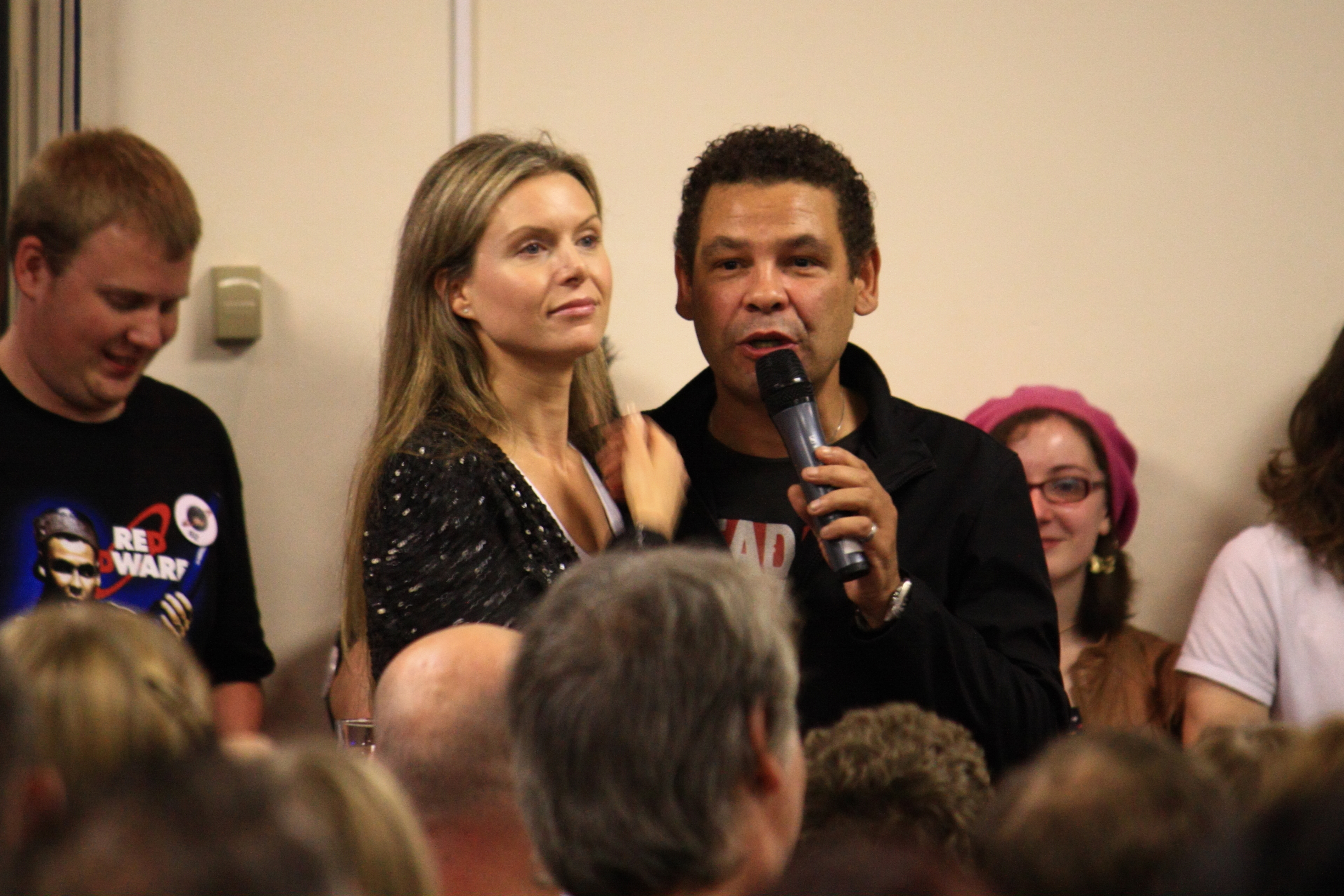 Craig Charles aka Dave Lister and Chloë Annett aka Kristine Kochanski from Red Dwarf at Dimension Jump XV, Birmingham UK